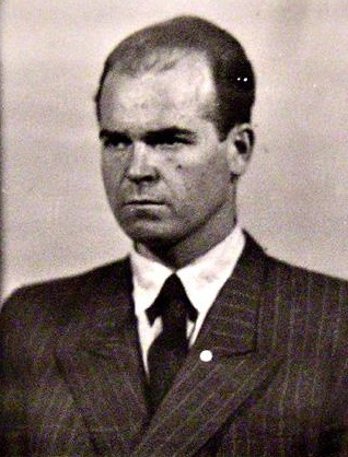 Vazební fotografie Václava Švédy (zdroj: ABS).